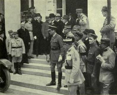 La delegación alemana abandona el Palacio de Trianon tras recibir los términos del Tratado de Versalles, 7 de mayo de 1919